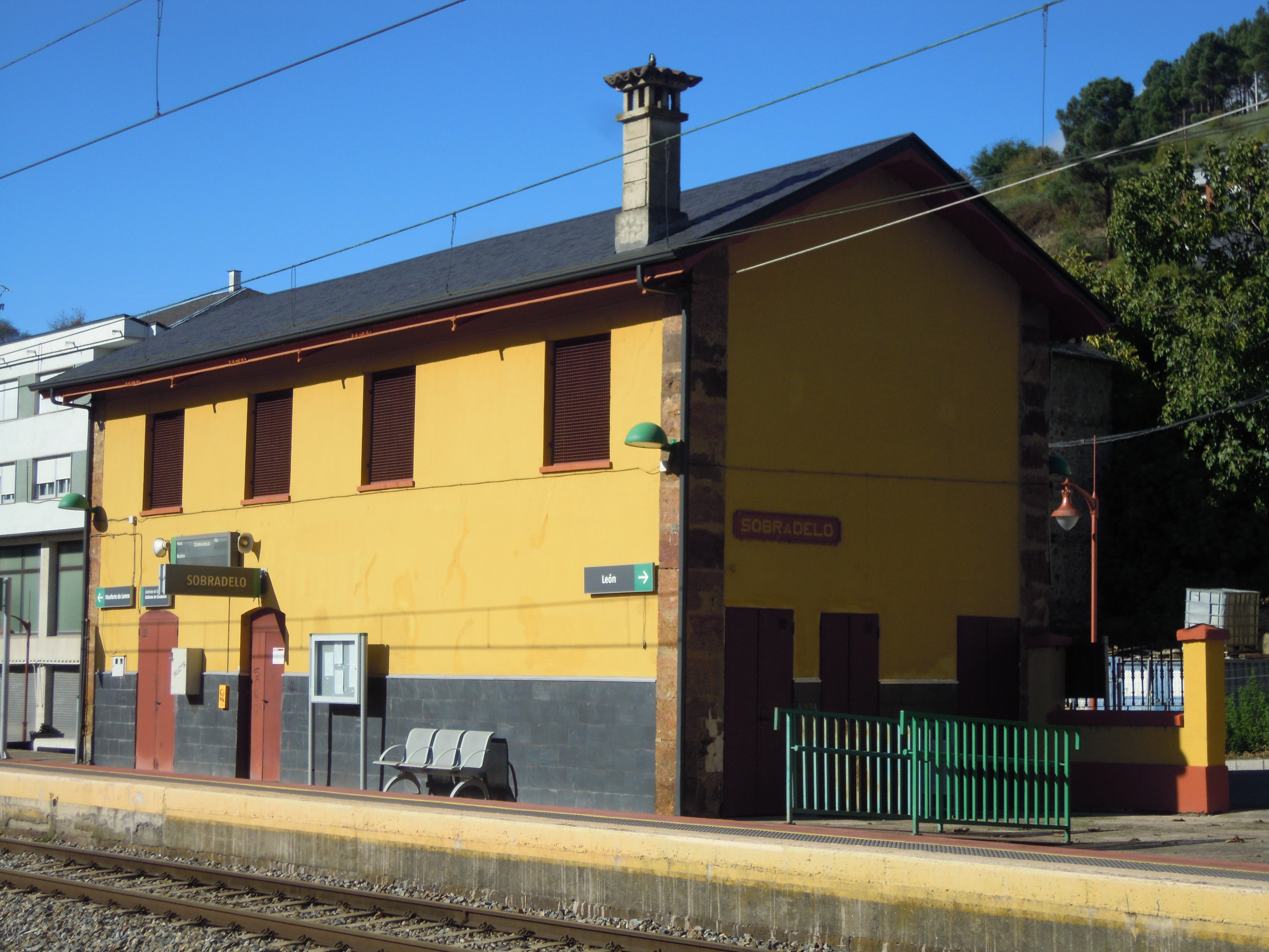 Estación de Sobradelo, en Sobradelo (Carballeda de Valdeorras). Edificio novo